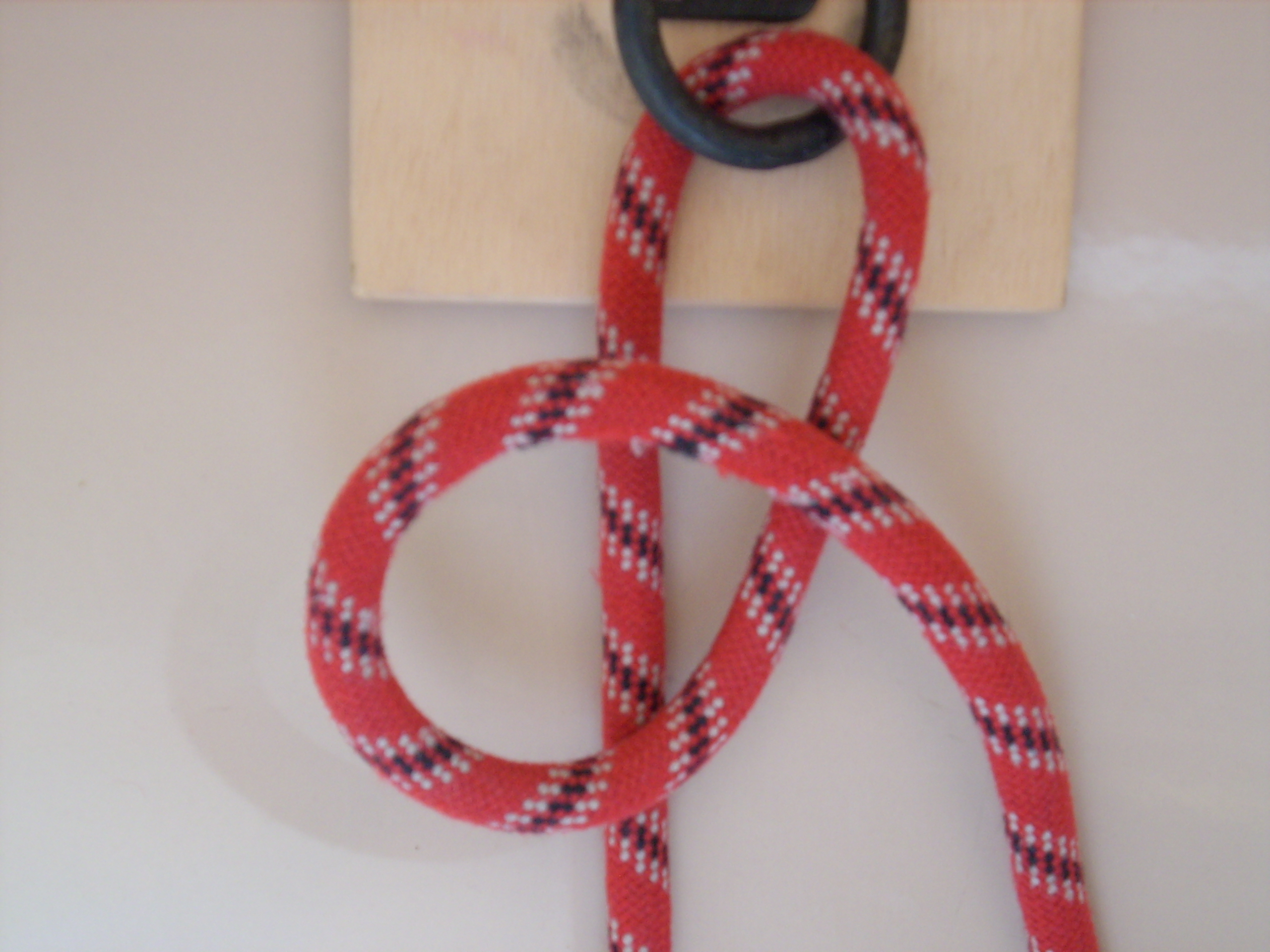 Auge auf ziehendes Ende gelegt.